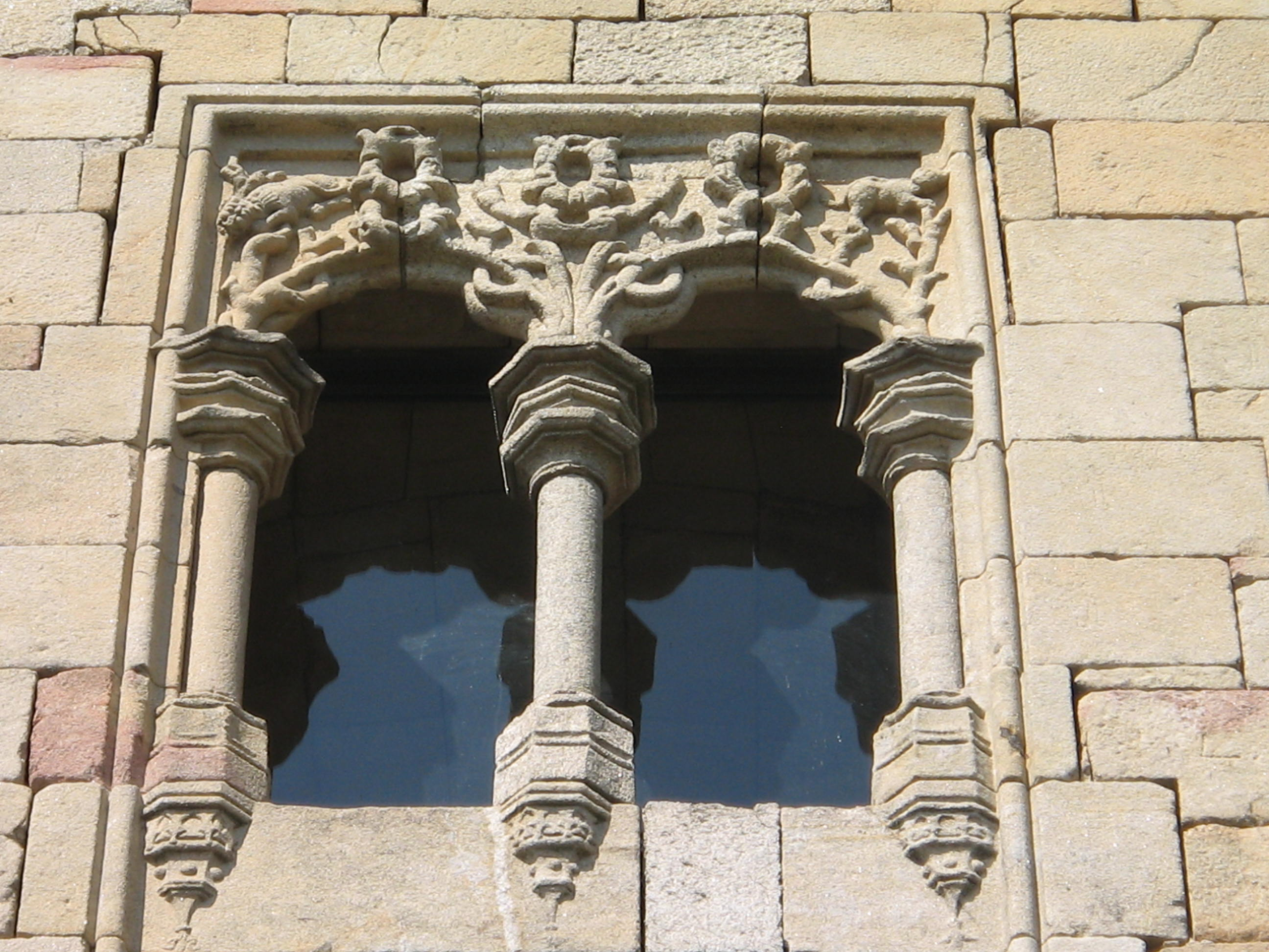 Janela Manuelina situada na Torre de Menagem do Castelo de Pinhel.Distrito da Guarda.